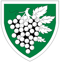 Das Wappen der niederösterreichischen Ortschaft Stixneusiedl